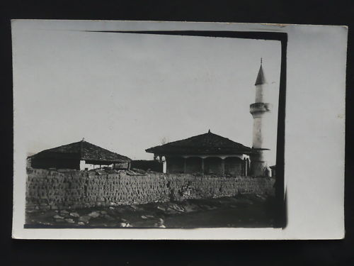 Криволак през Първата световна война.